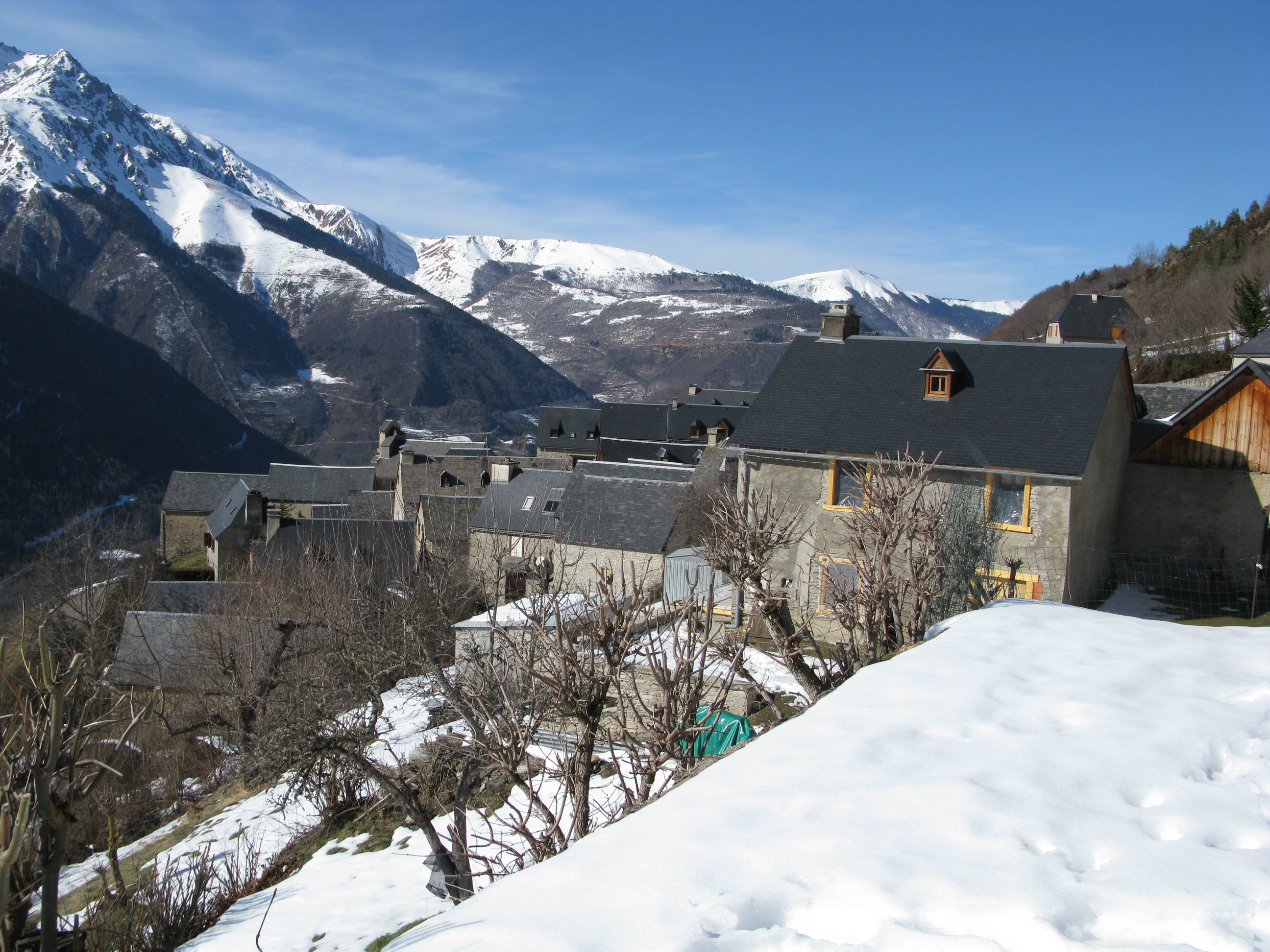 Grailhen - Vue sur le village